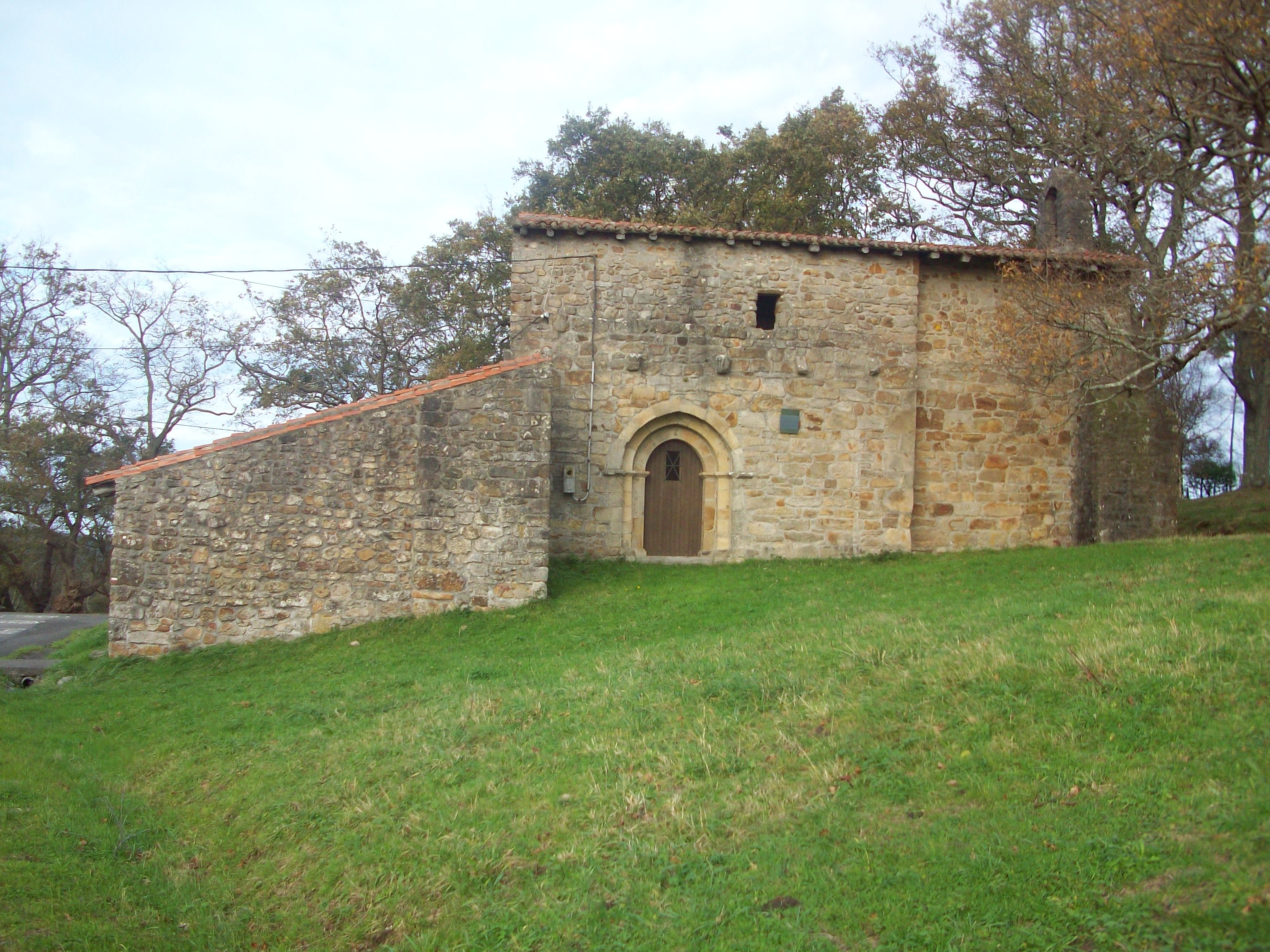 Mungiako Zumetxaga baseliza.